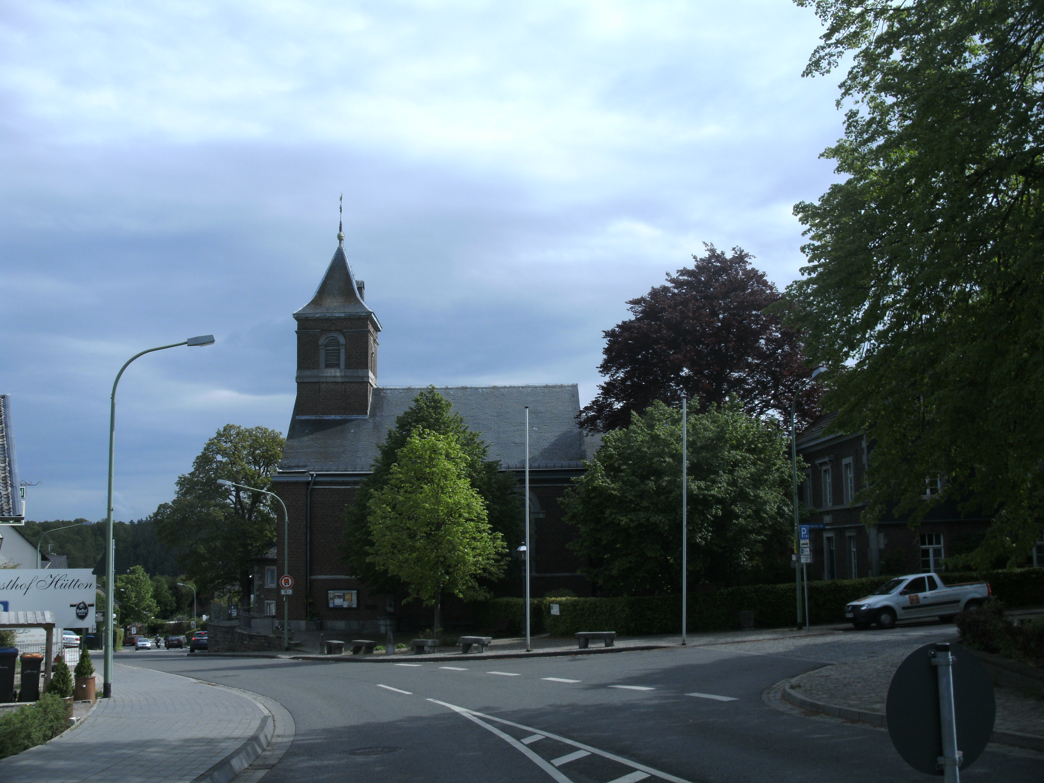 The church of Rott, a suburb of Roetgen, Germany